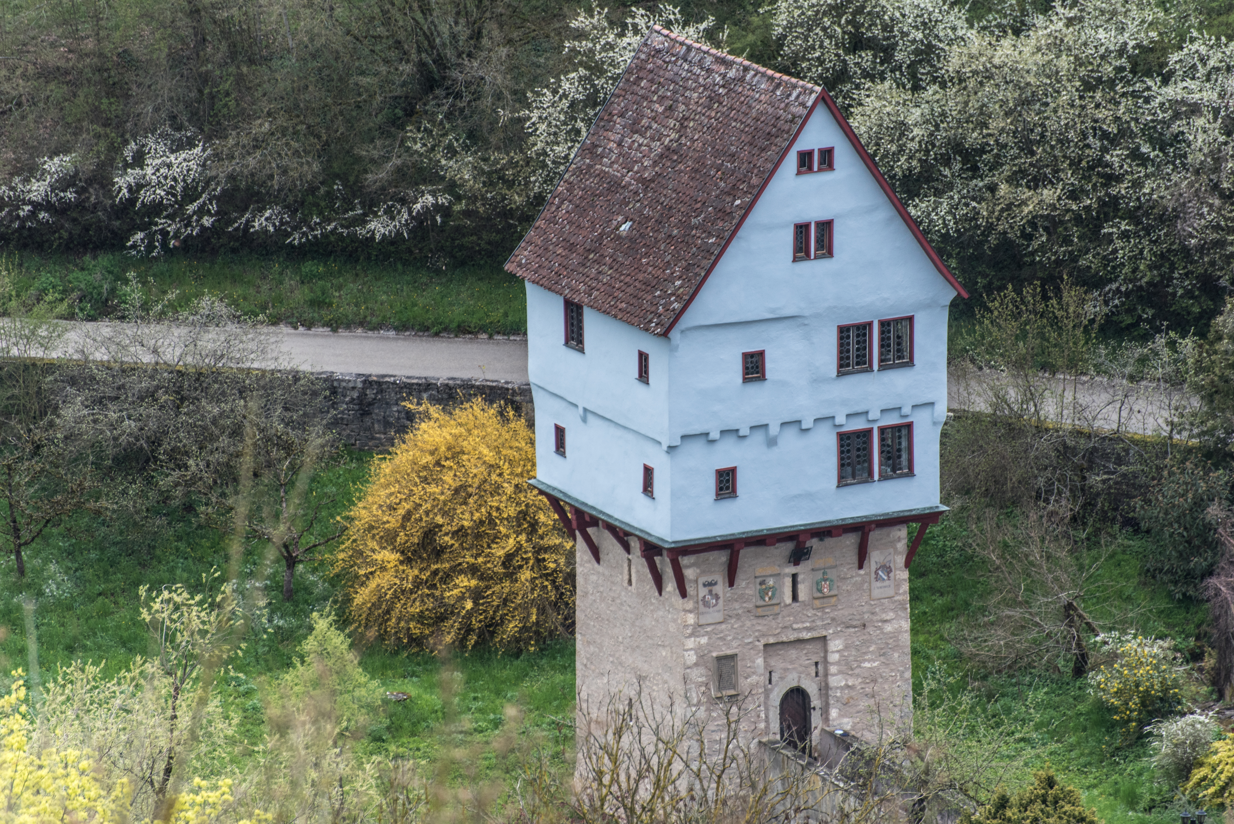 Rothenburg ob der Tauber, Taubertalweg 98